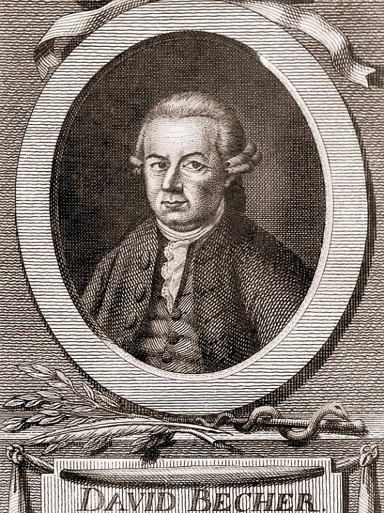 Dr. David Becher, lékař a balneolog